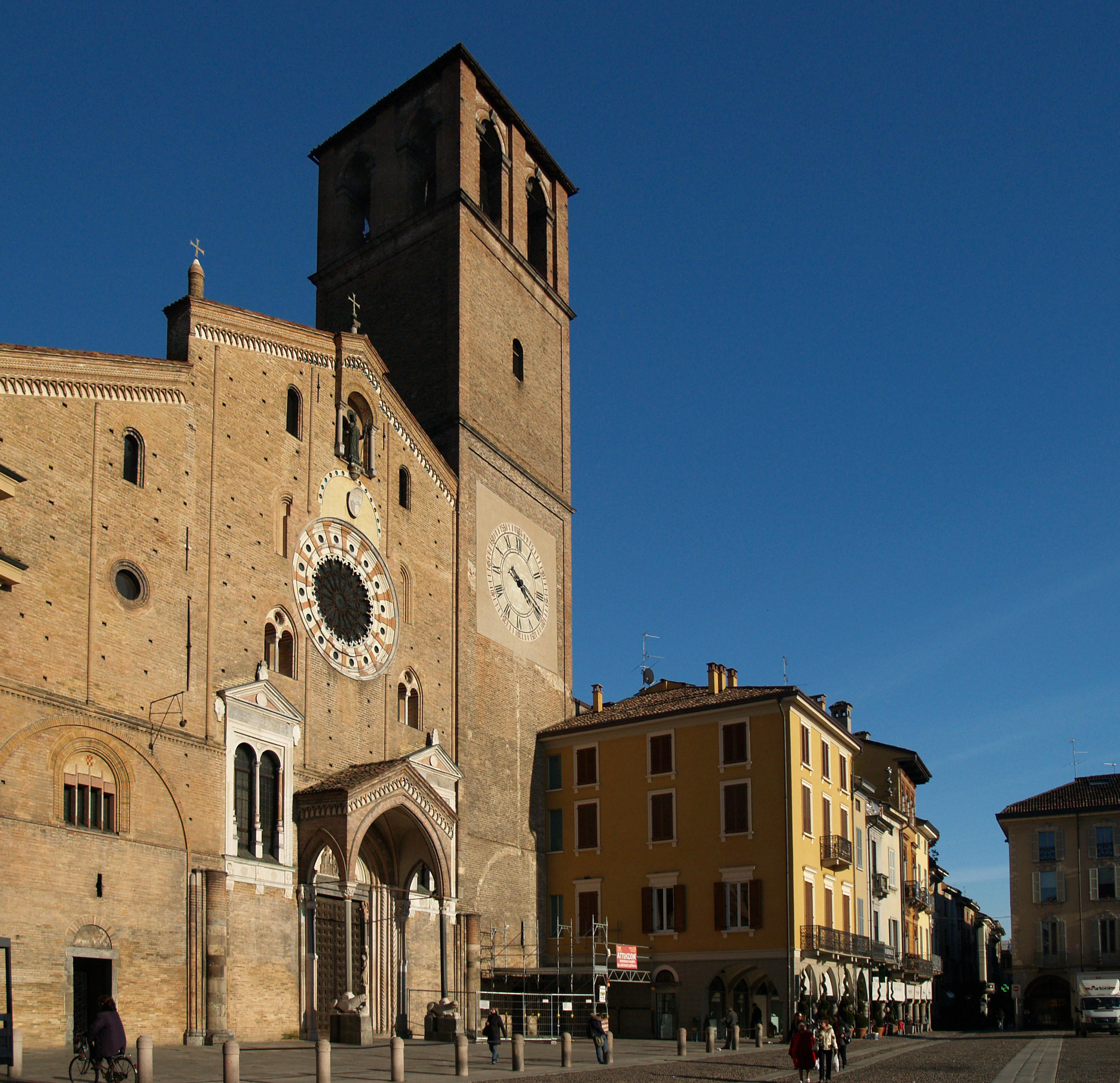 Piazza della Vittoria, Lodi.